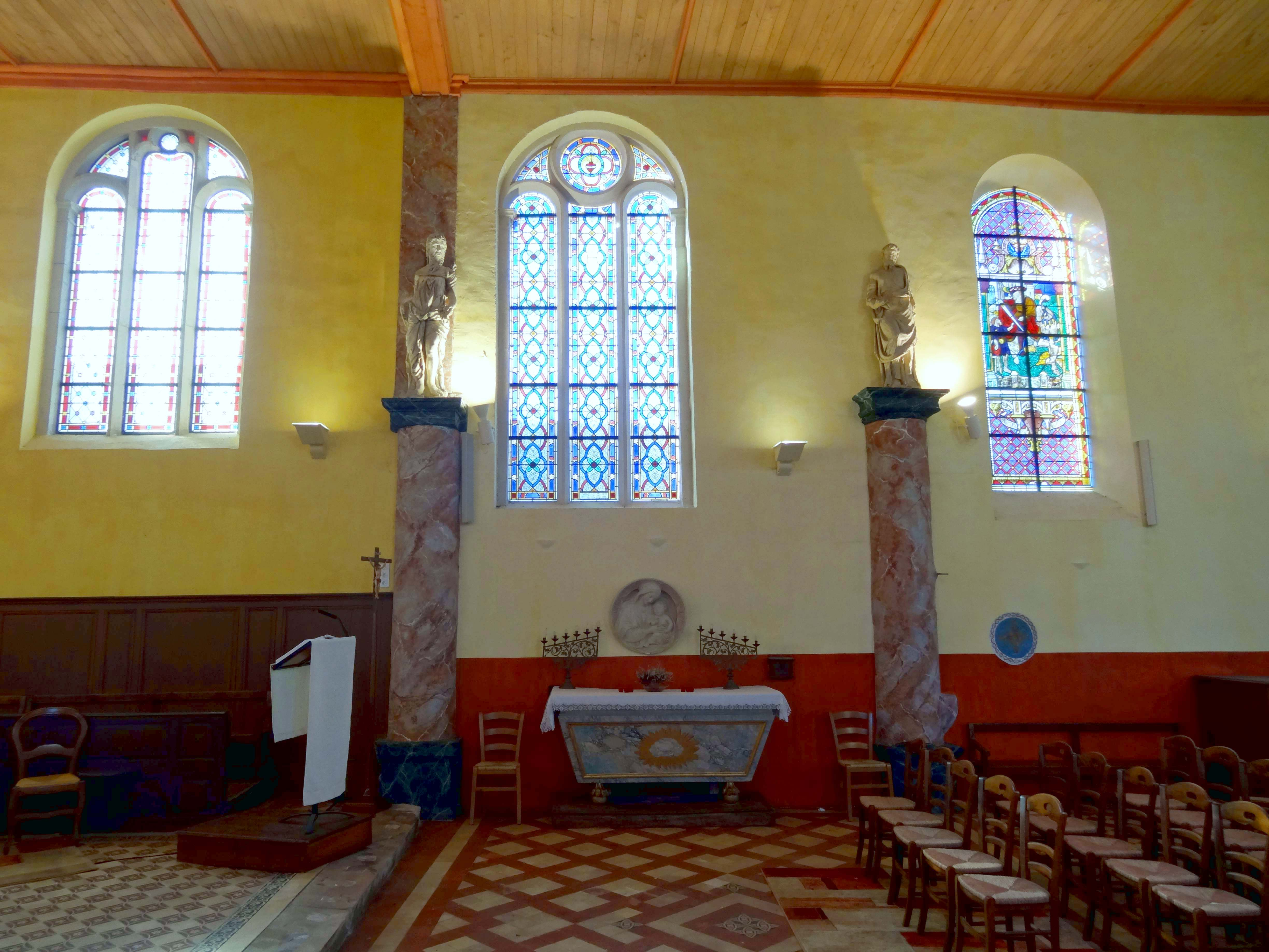 Intérieur de l'église - voir titre.